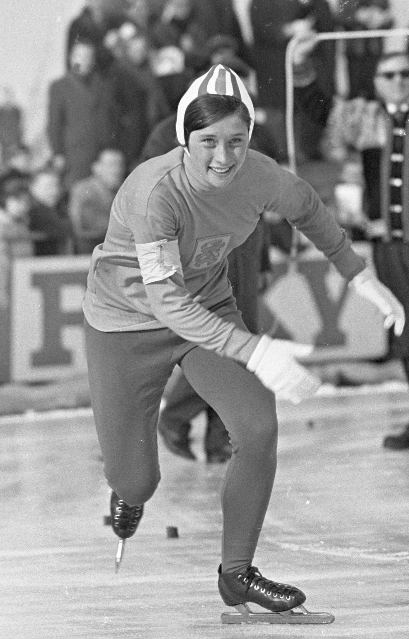 Wil Burgmeijer